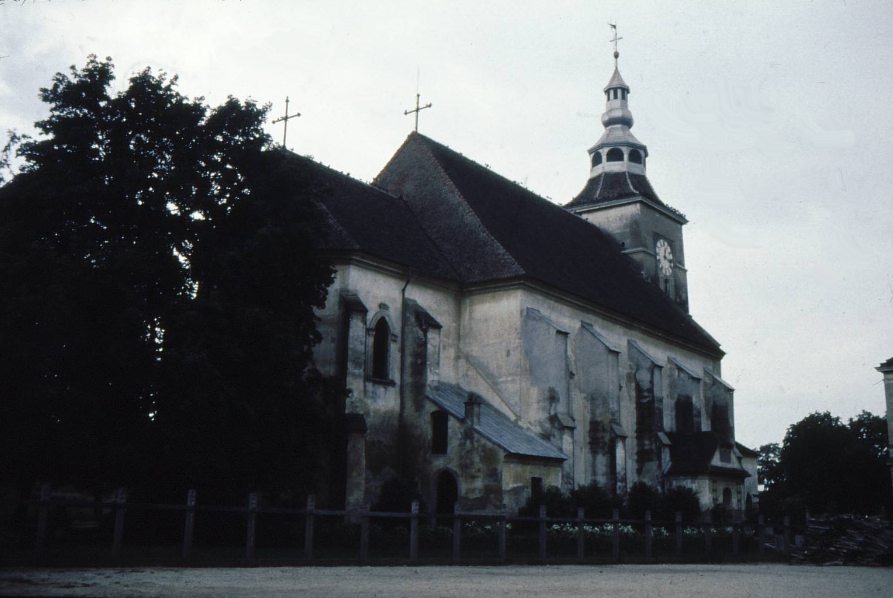 Heldsdorf Kirche, 1966